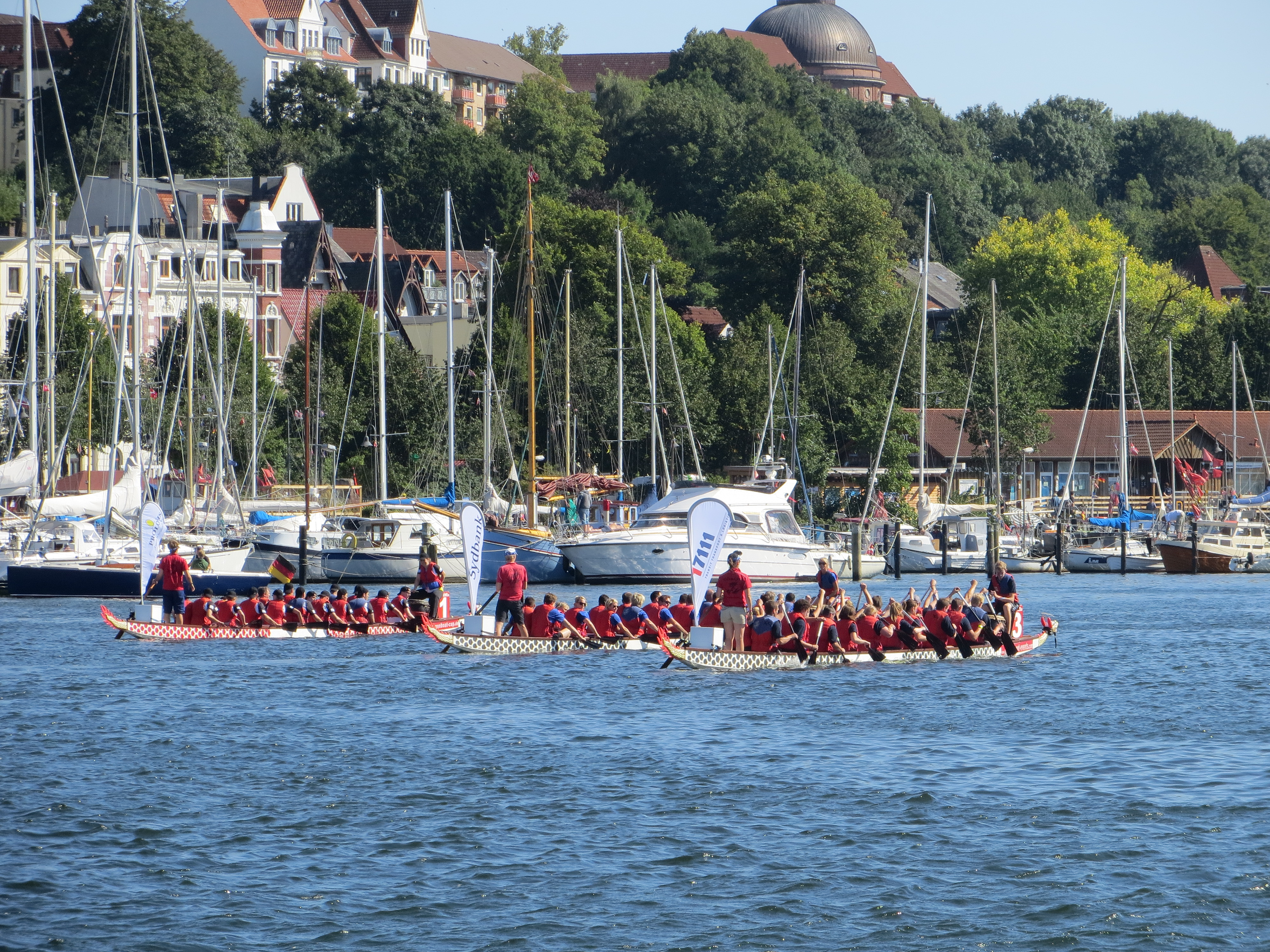 Vom Flensburger Drachenbootrennen, 2013, Bild 05